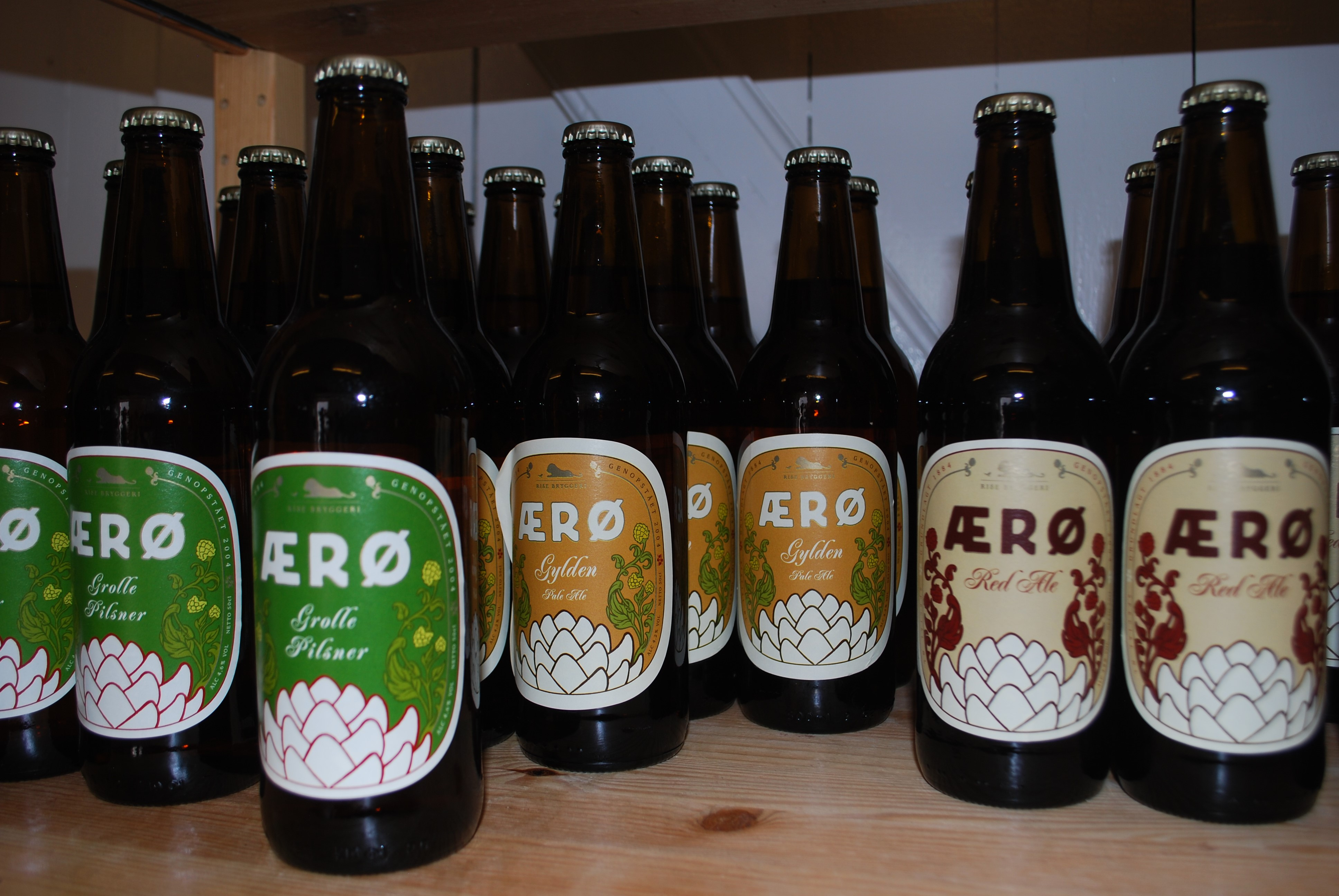 Rise Bryggeris 0,5 liter flasker